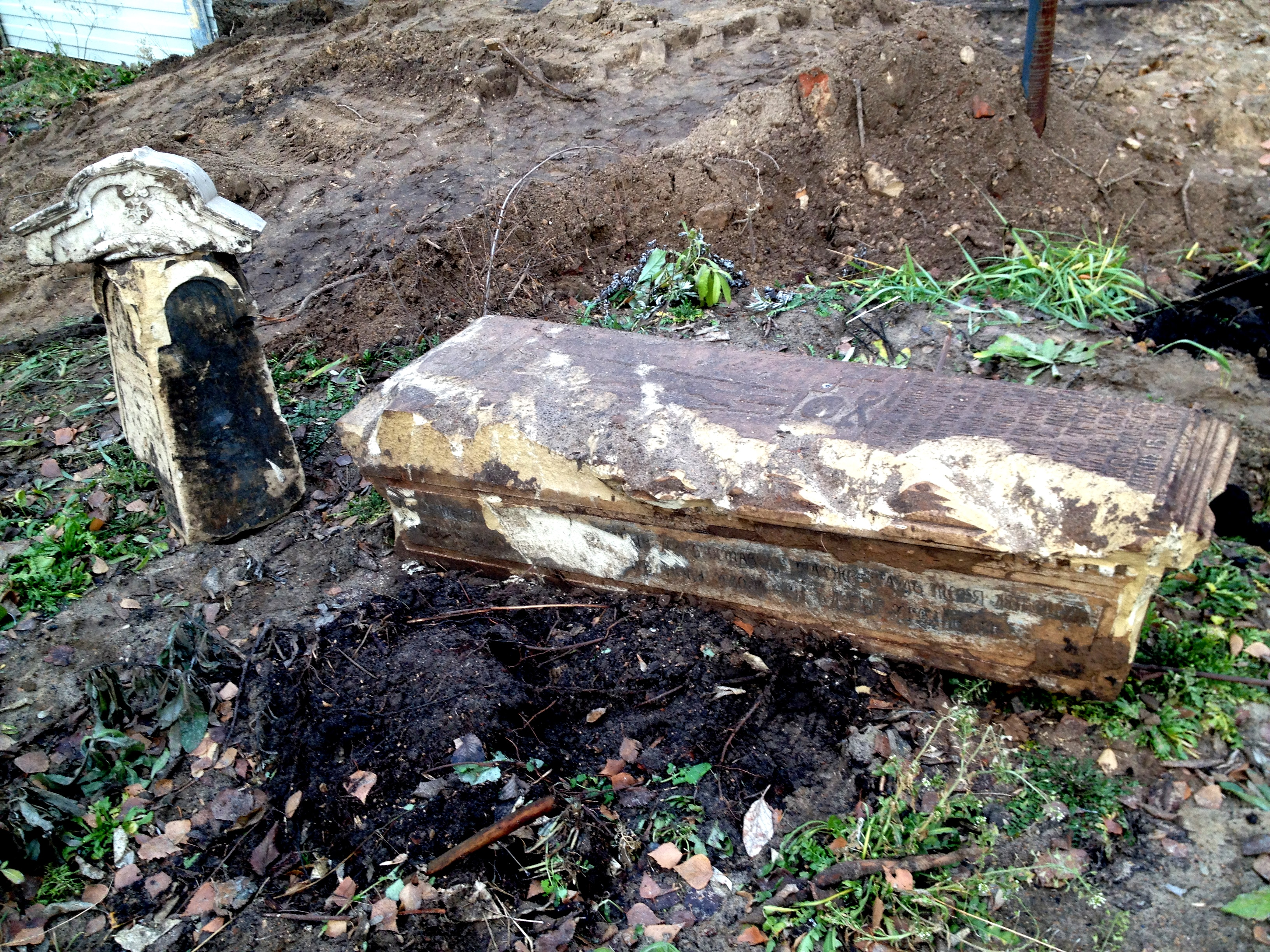 Фрагменты надгробий, найденные на территории бывшего некрополя Кизического Введенского монастыря (г. Казань).